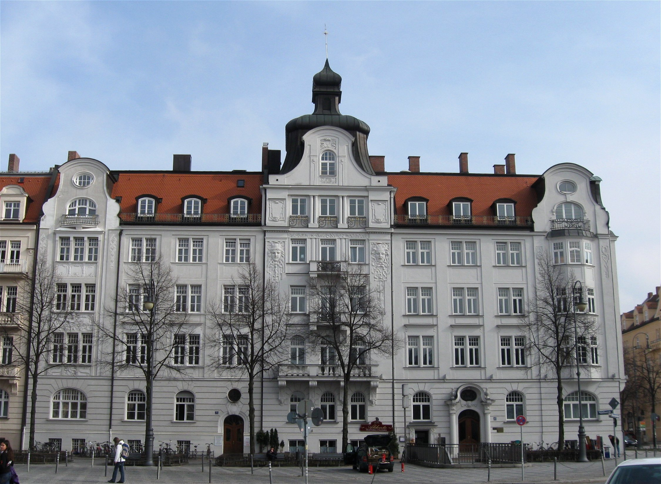 Prinzregentenplatz 21; Mietshaus, barockisierender Jugendstil, mit Stuckdekor, 1901 von Hans Hartl; Gruppe mit Nr. 23. Prinzregentenplatz 23; Eckhaus, barockisierender Jugendstil, mit Kuppelaufsatz und Stuckdekor, um 1900 wohl von Carl Vent; Gruppe mit Nr. 21.